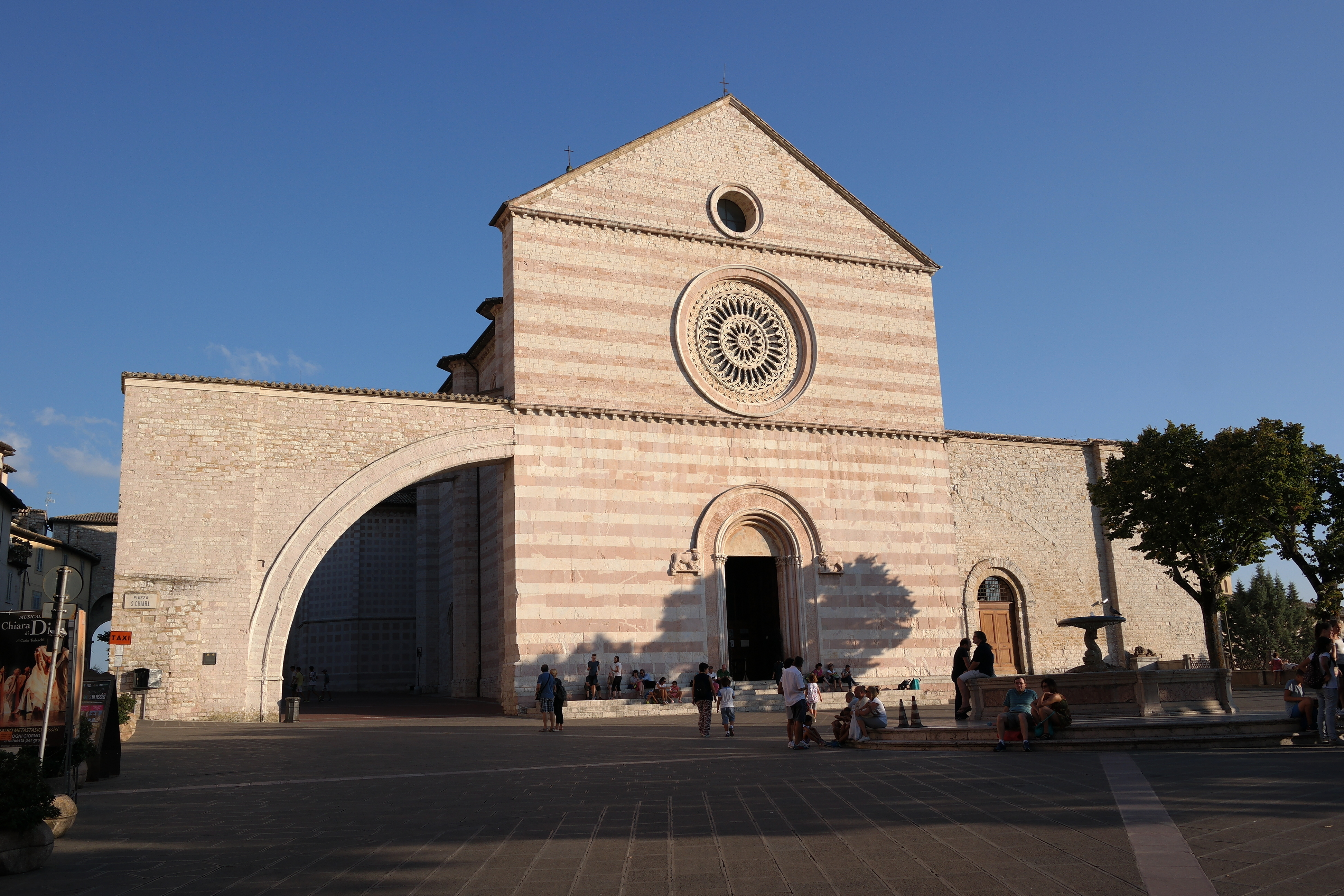 Esterno della Basilica di Santa Chiara di Assisi